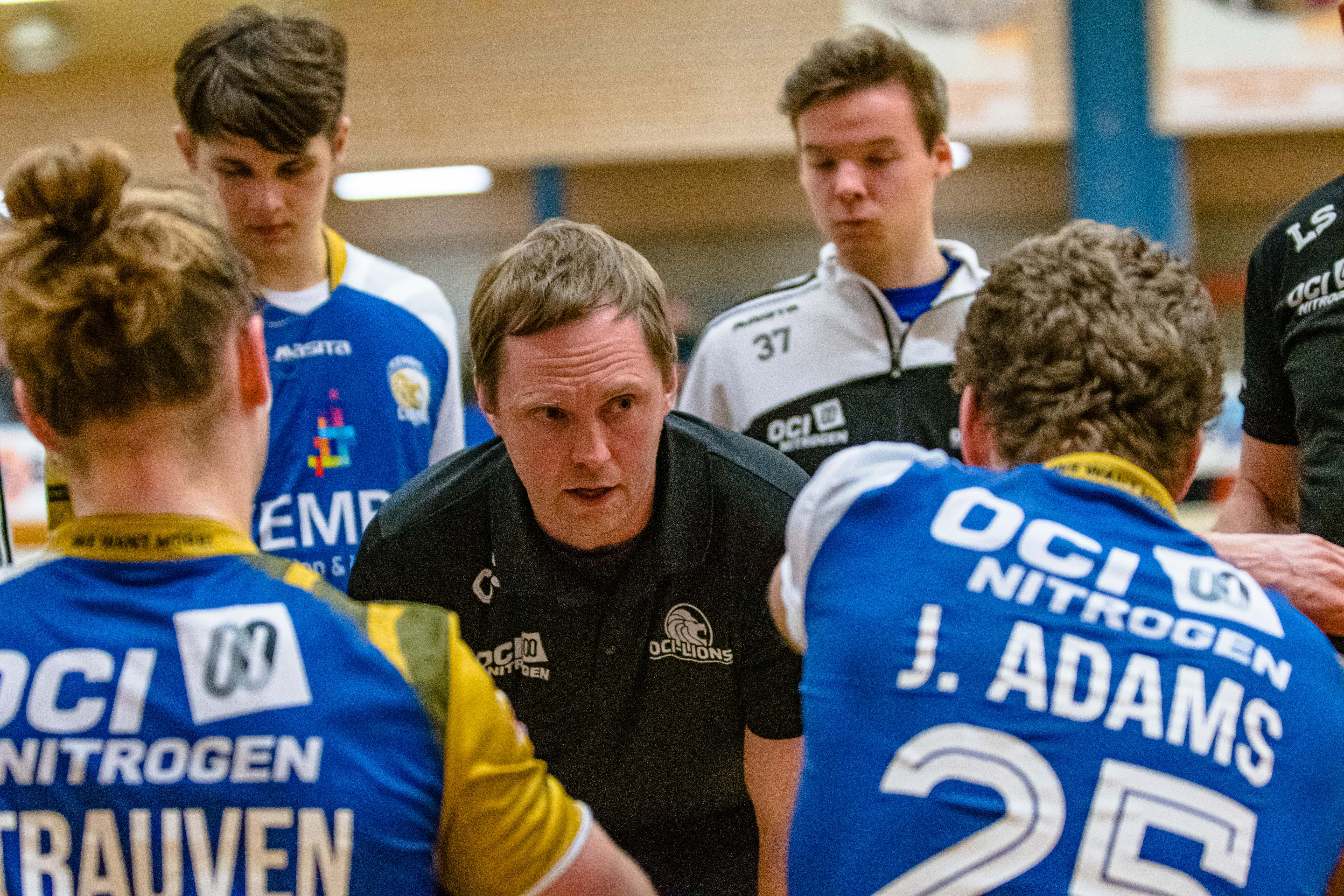 Team Time-Out Kembit-Lions, ©FotoReza